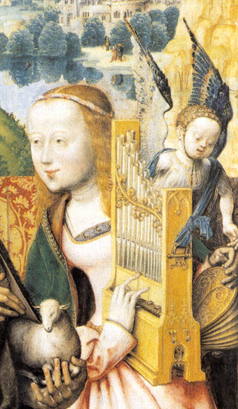 Sainte-Cécile jouant de l'orgue - Détail du rétable